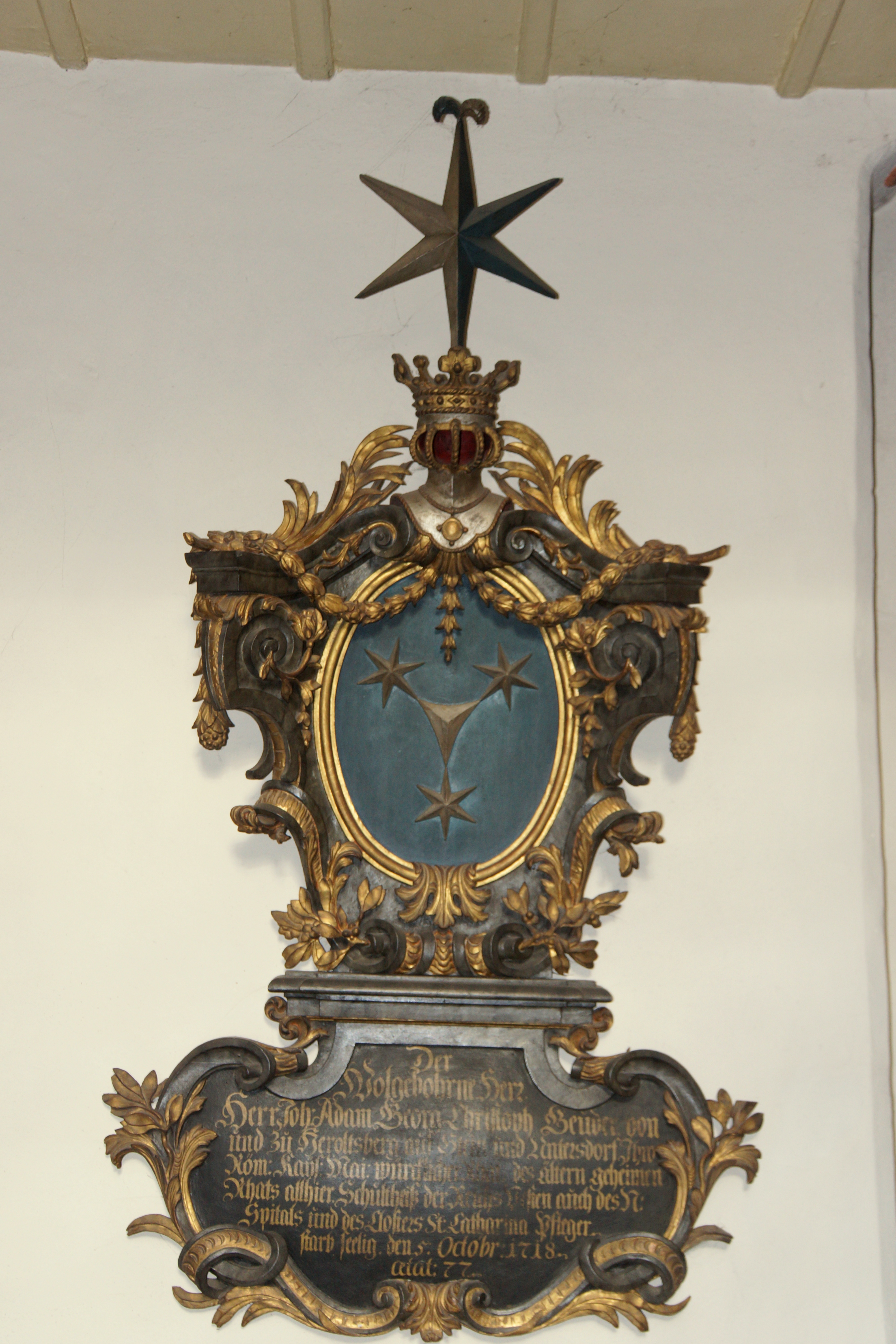 Die Friedhofskirche St. Johannis in Nürnberg